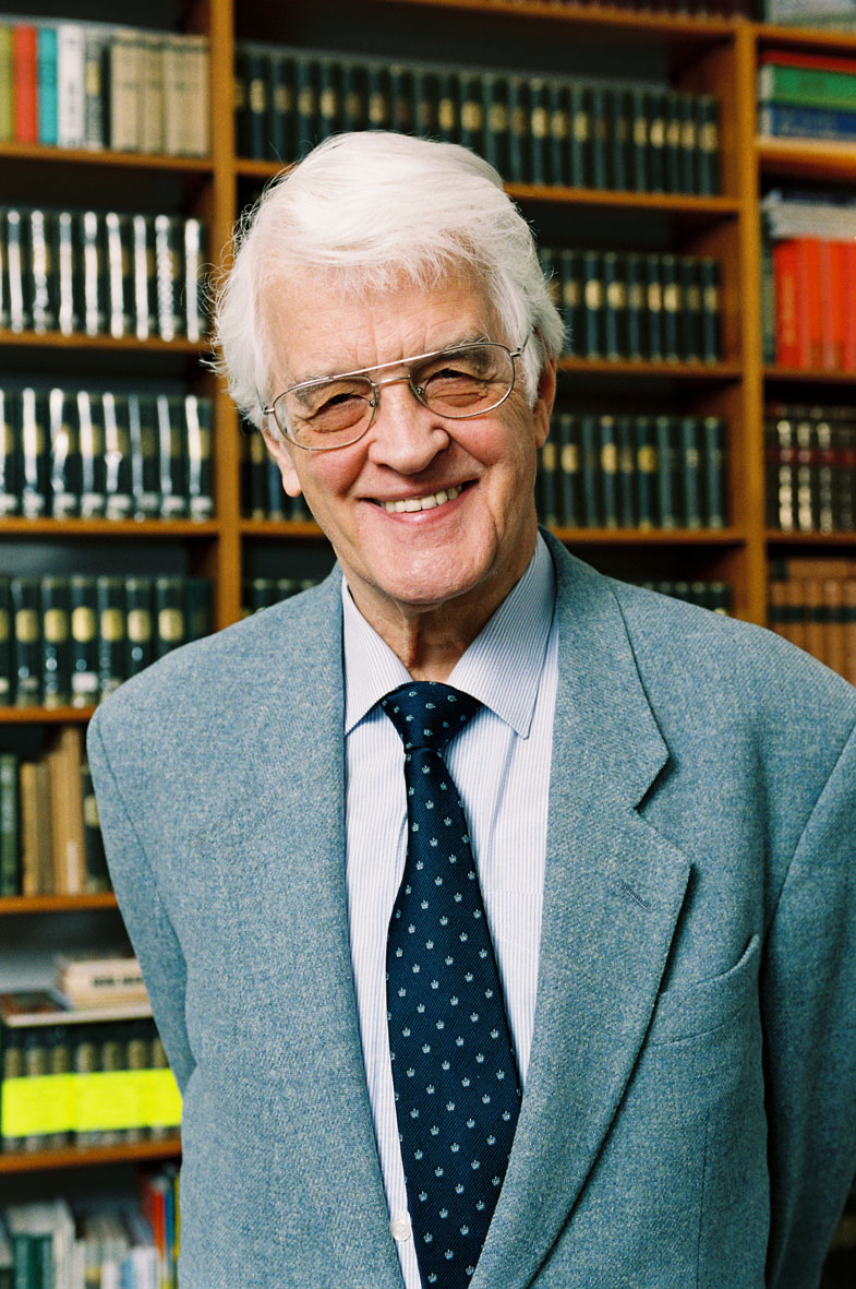 Lothar Schmid, 2005.